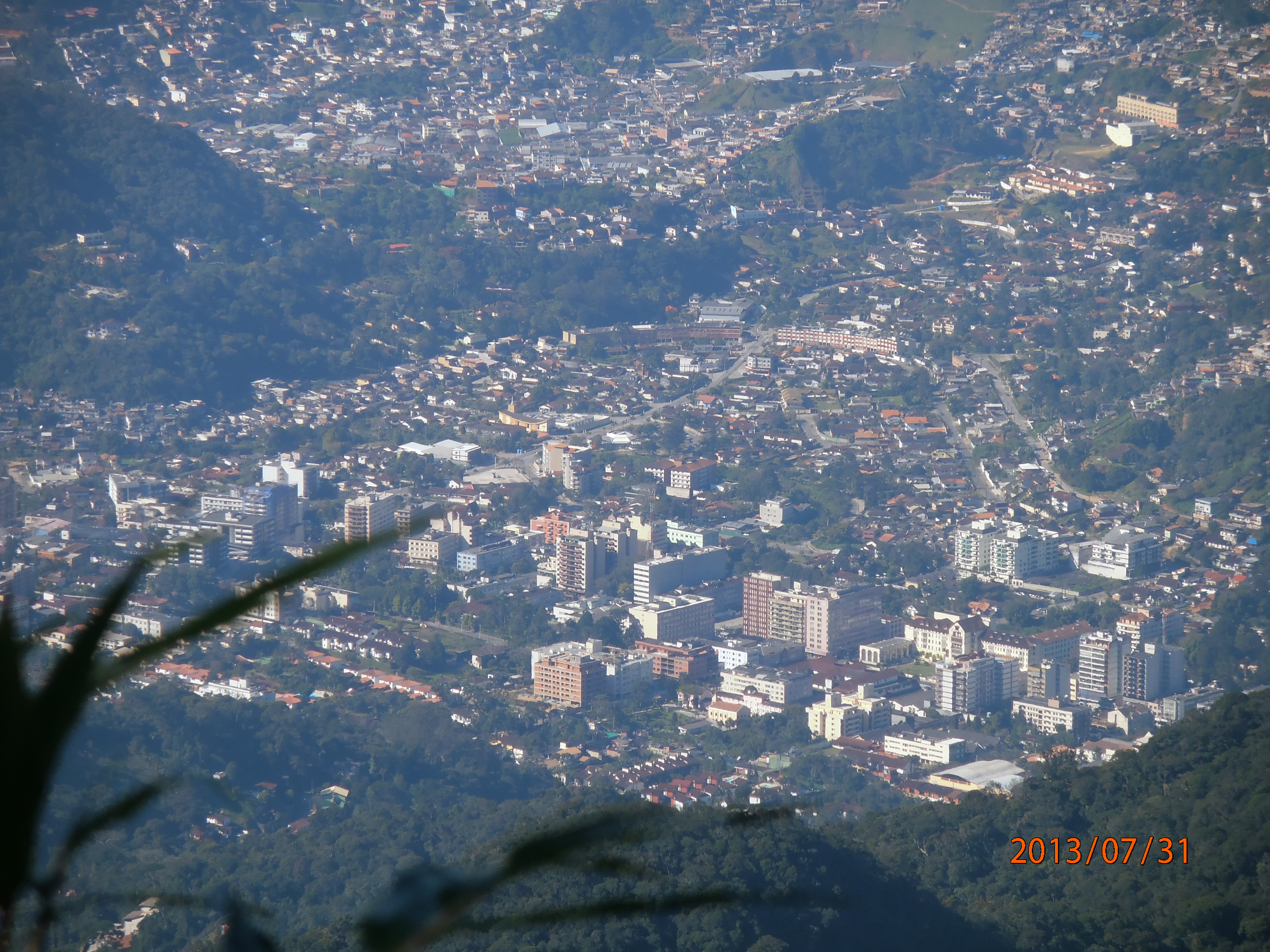 Teresópolis RJ Brasil - Cidade vista da Trilha do Sino